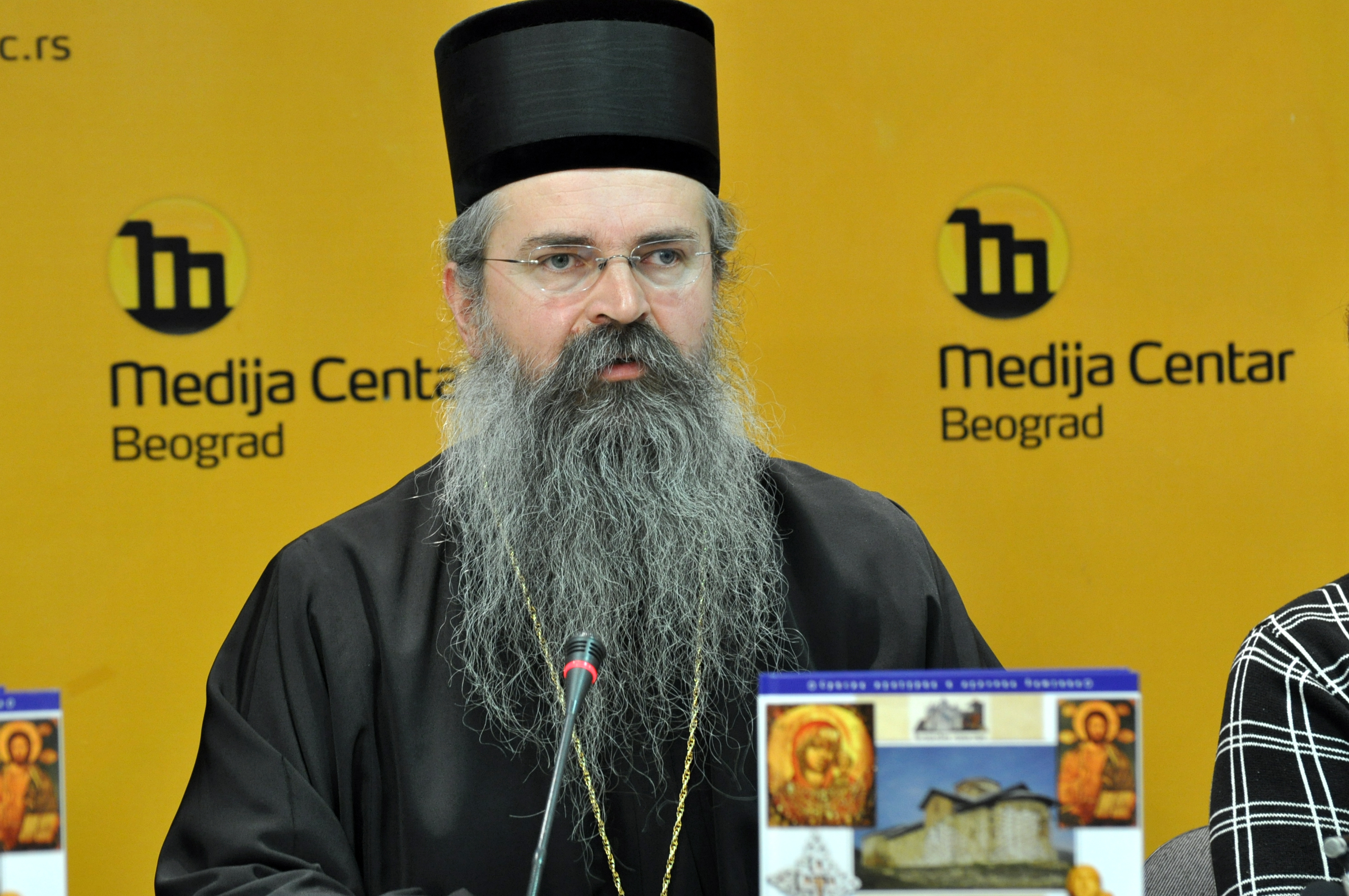 Владика рашко-призренски Теодосије. Слика преузета одавде.